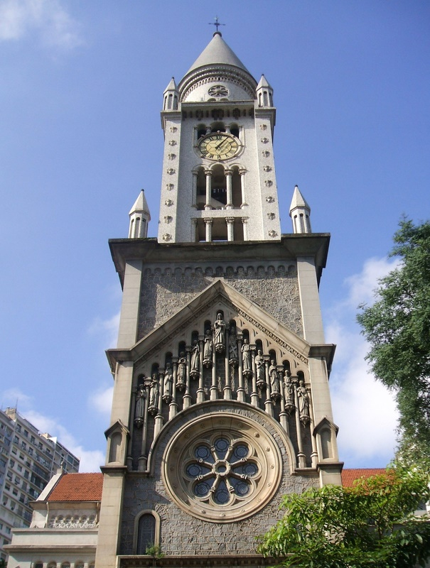 Torre da Igreja da Consolação, no centro de São Paulo.